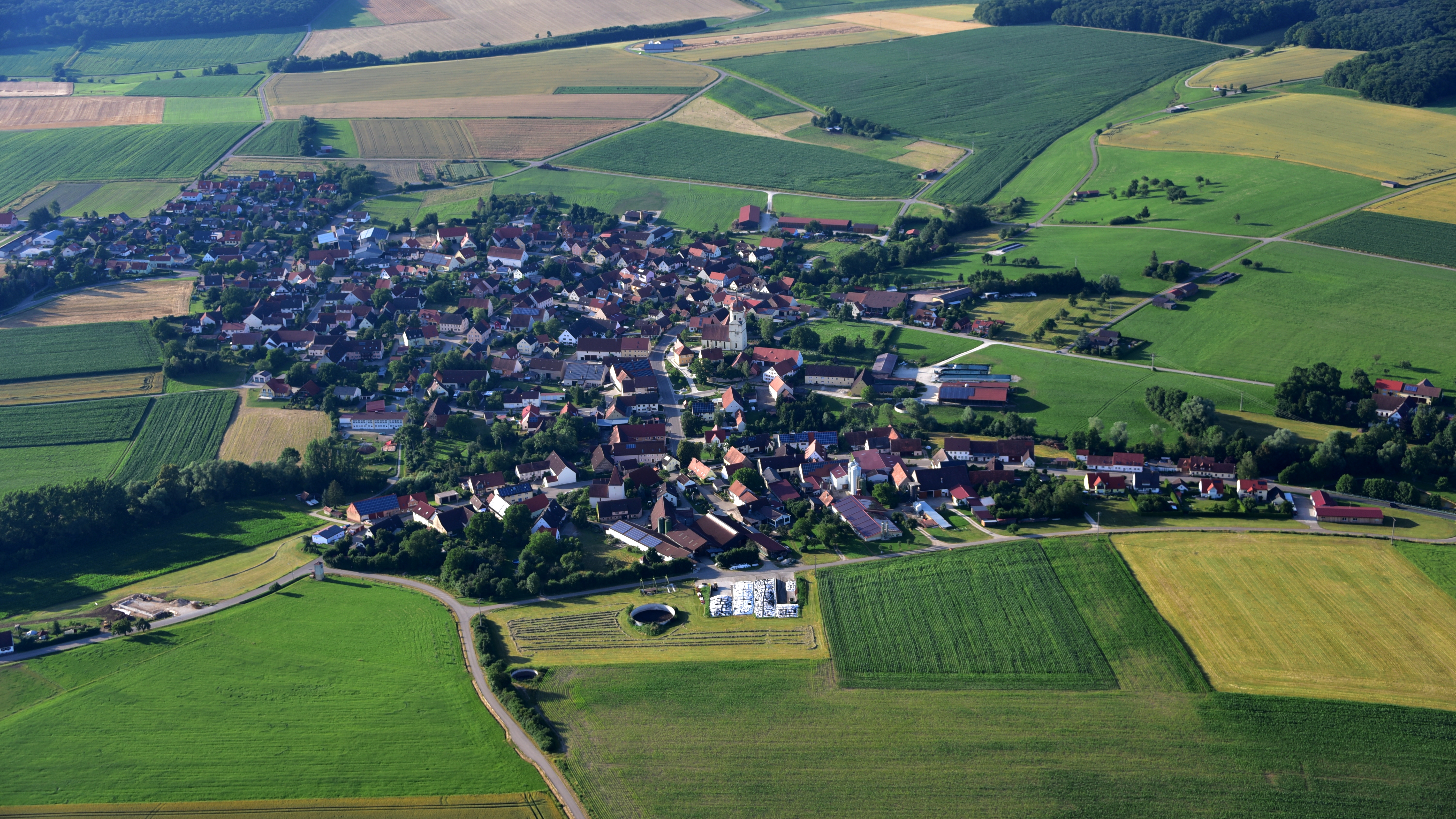 Geilsheim, Luftaufnahme (2016)